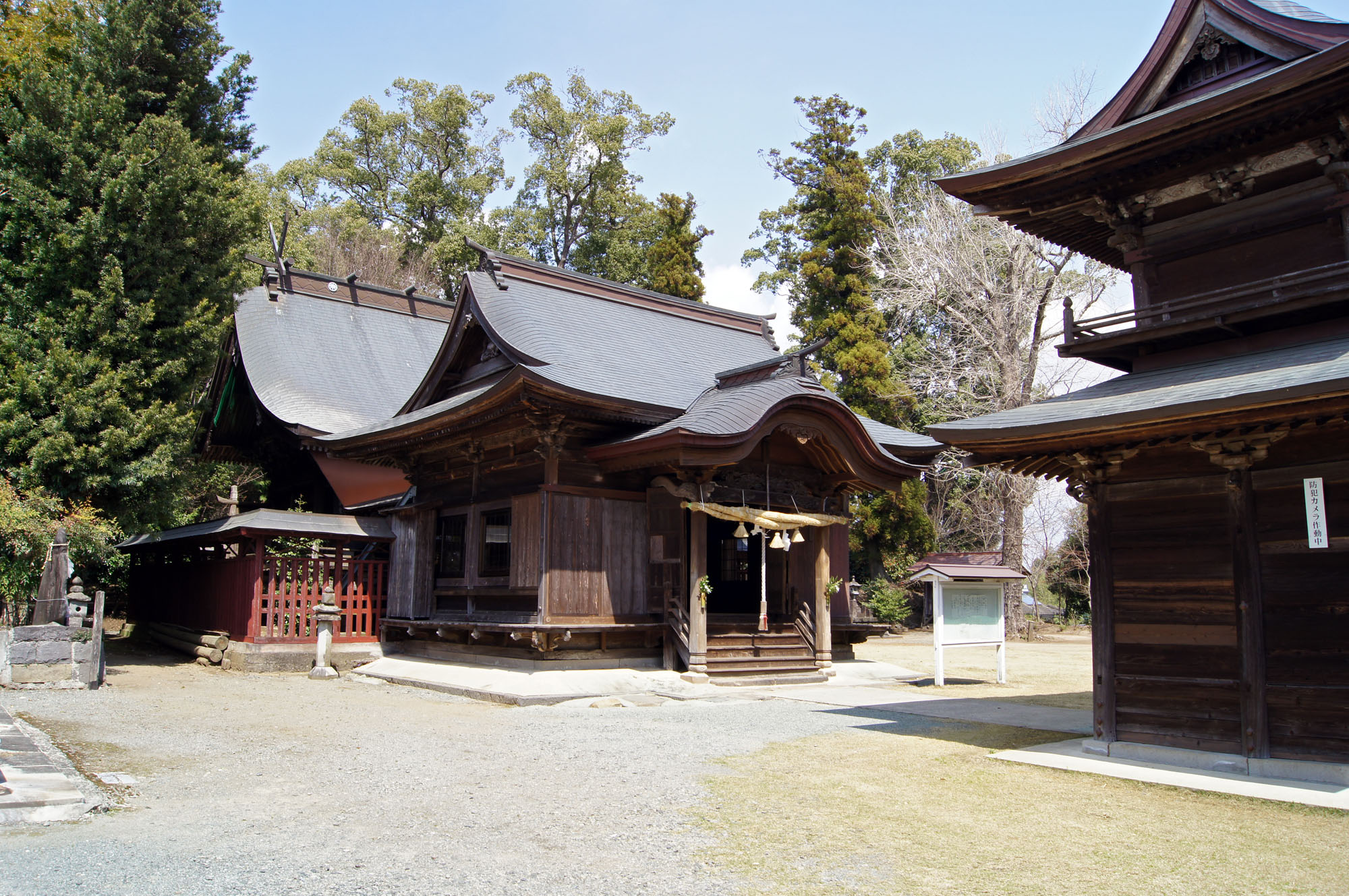 竹迫日吉神社（たかばひよしじんじゃ） 熊本県合志市